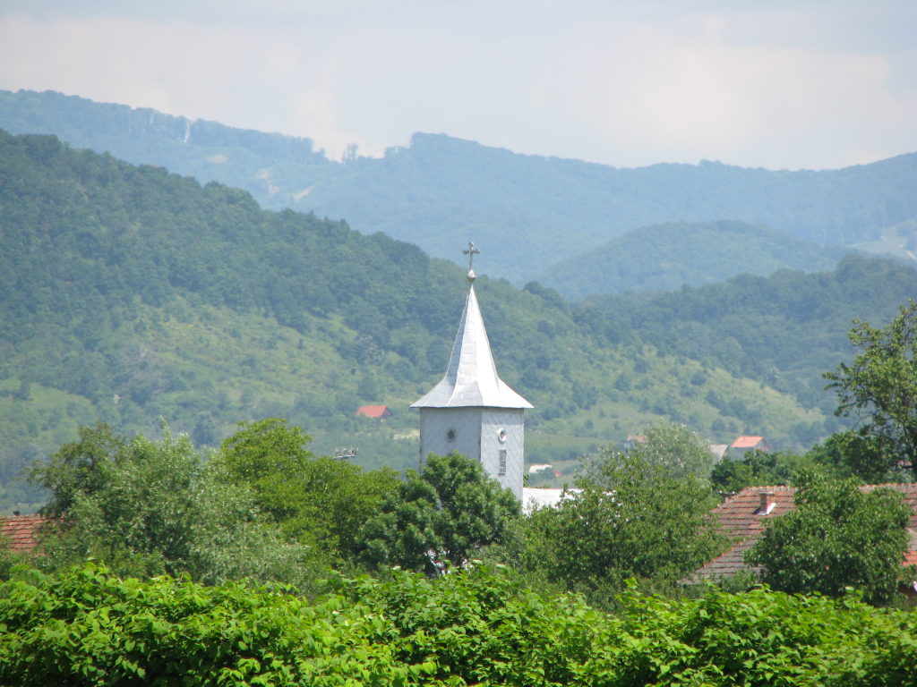 Biserica vazuta din departare